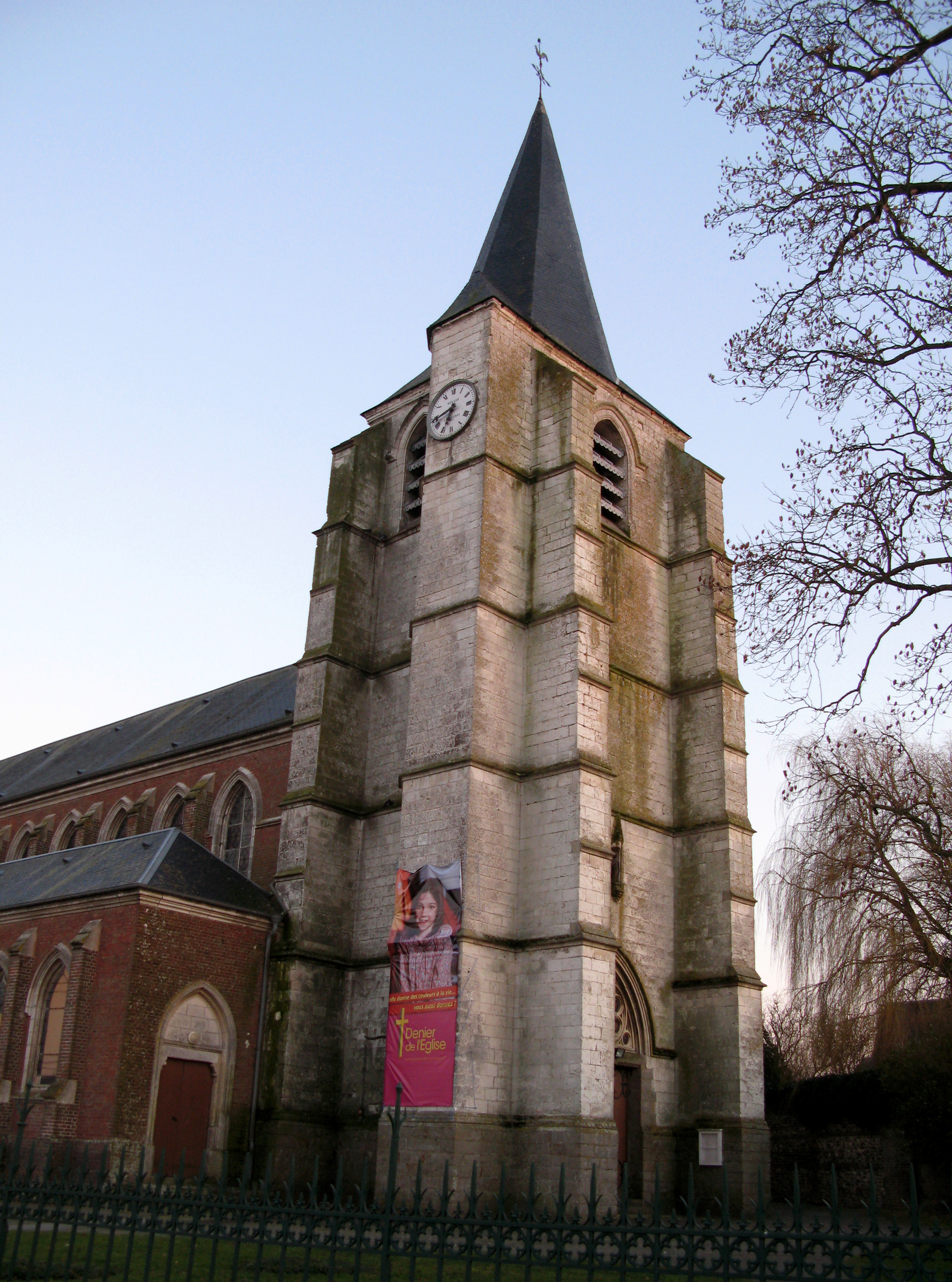 Nouvion (Somme, France) - L'église. .